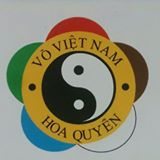 Huy hiệu môn phái võ Hoa Quyền Việt nam